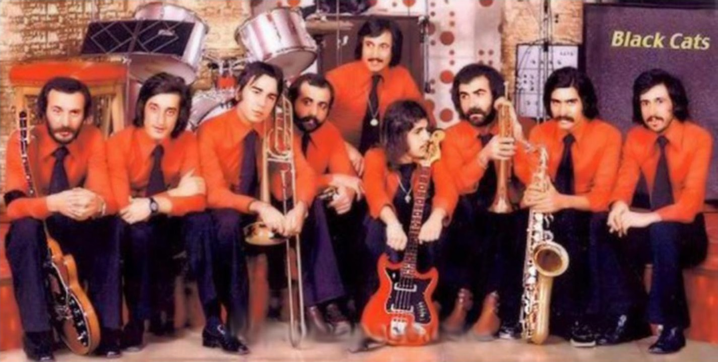 اعضای گروه بلک کتس در دهه 1340 خورشیدی